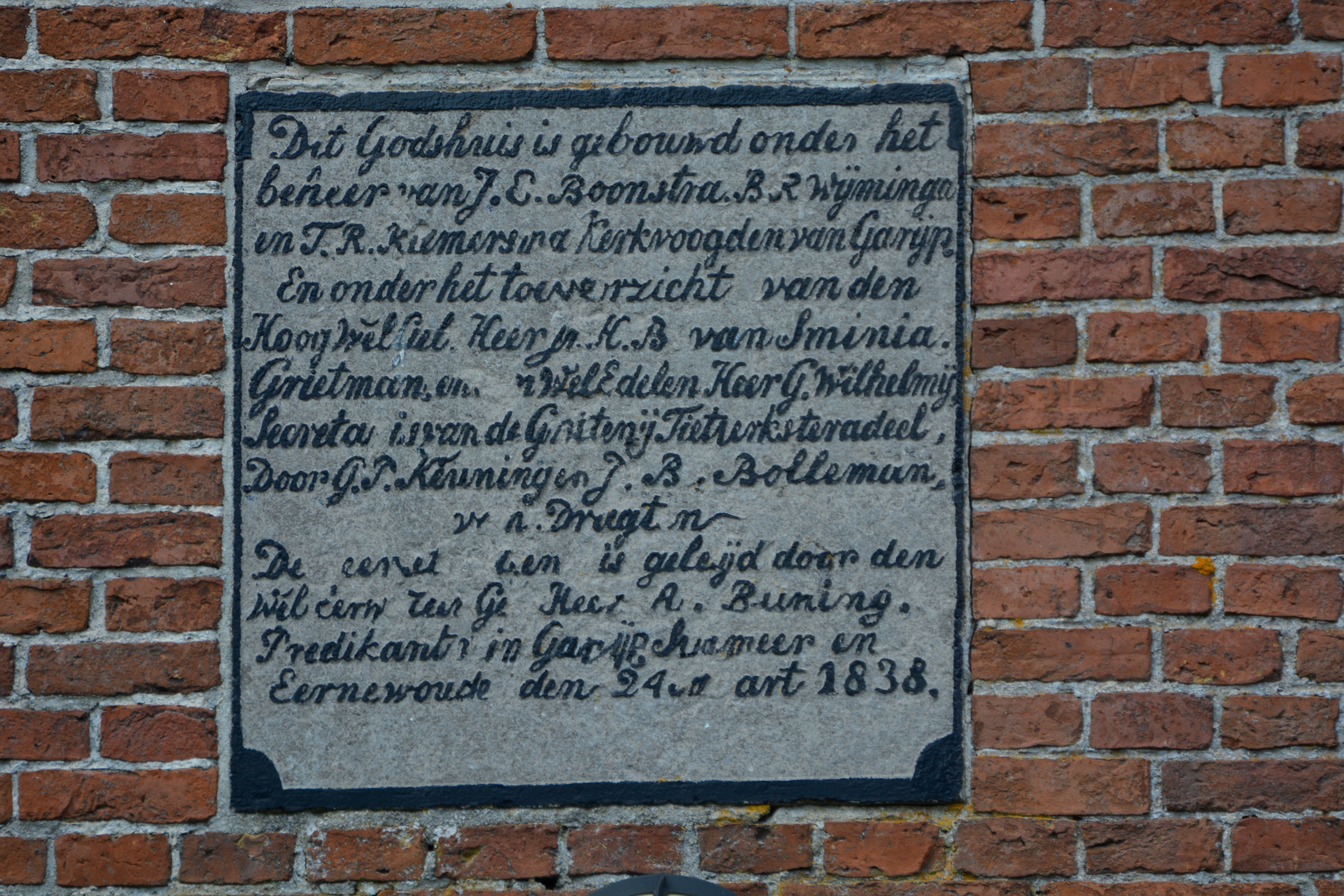 Garyp, Petruskerk, gevelsteen